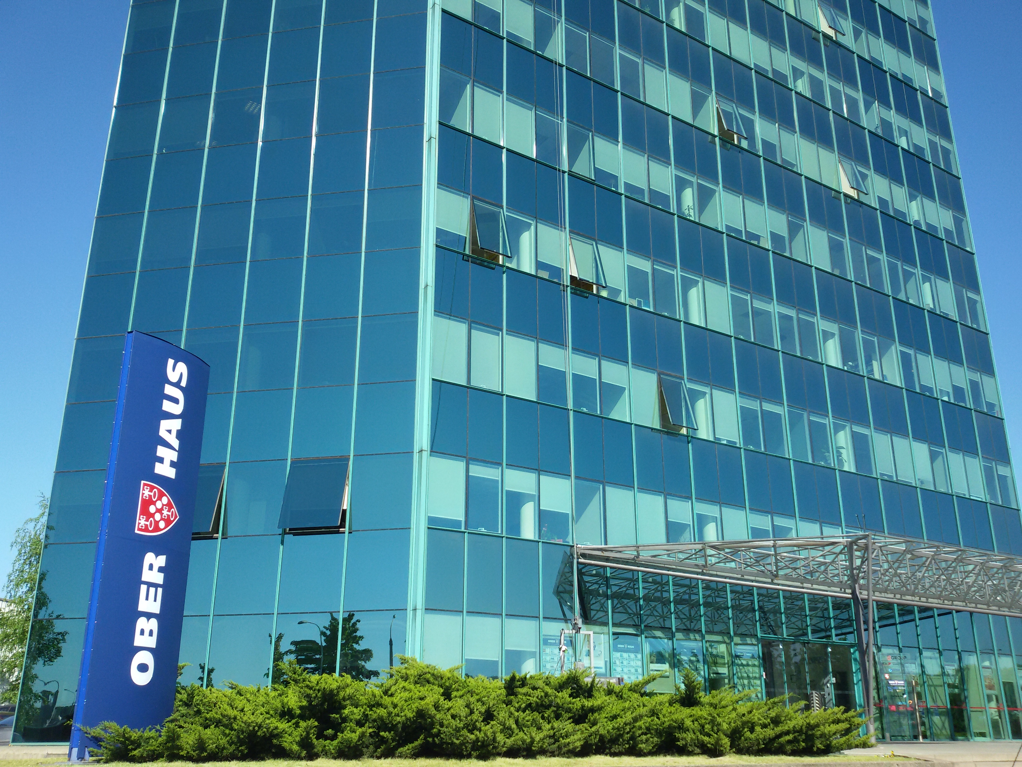 Geležinio Vilko g. 18A, LT-08104 Vilnius